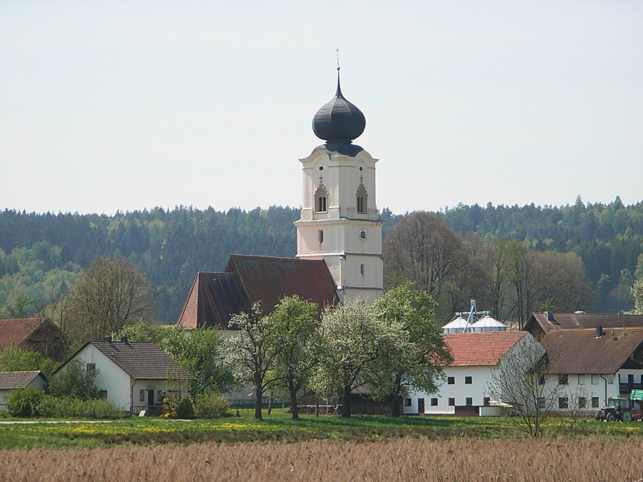 Die Wallfahrtskirche St. Gregor in Grongörgen